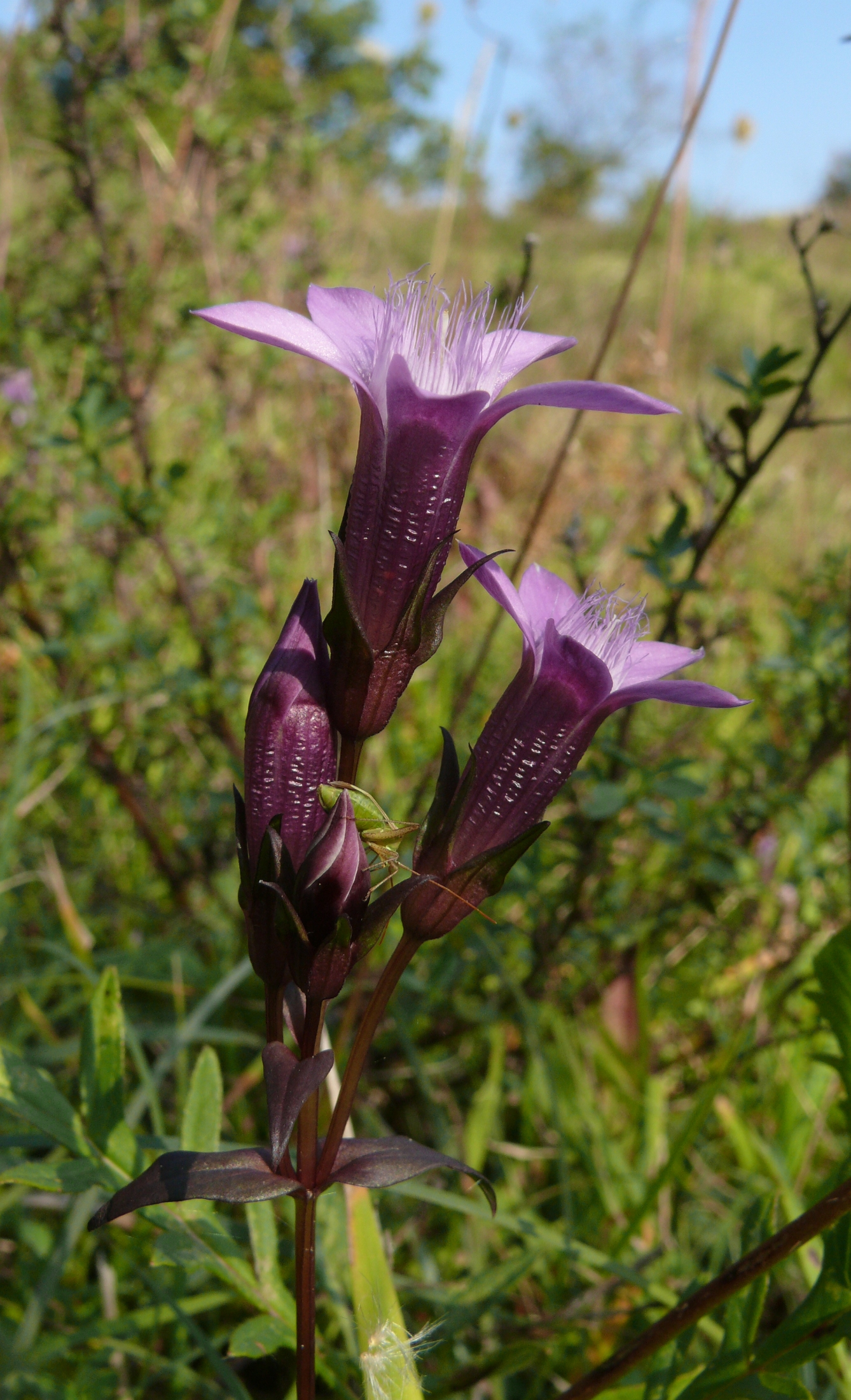 Gentianella germanica, Schwäbisch Alb, Germany